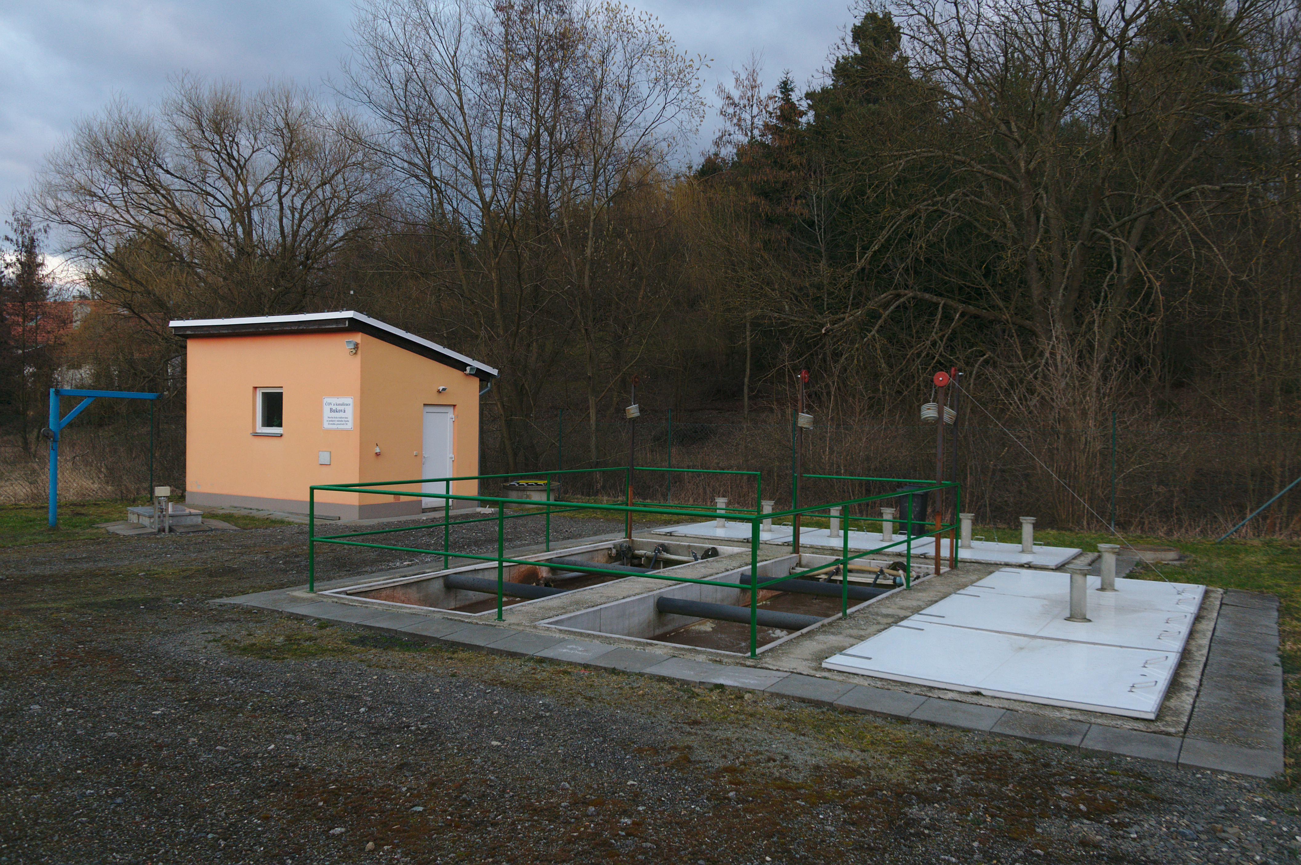 Čistička odpadních vod, Buková, okres Prostějov